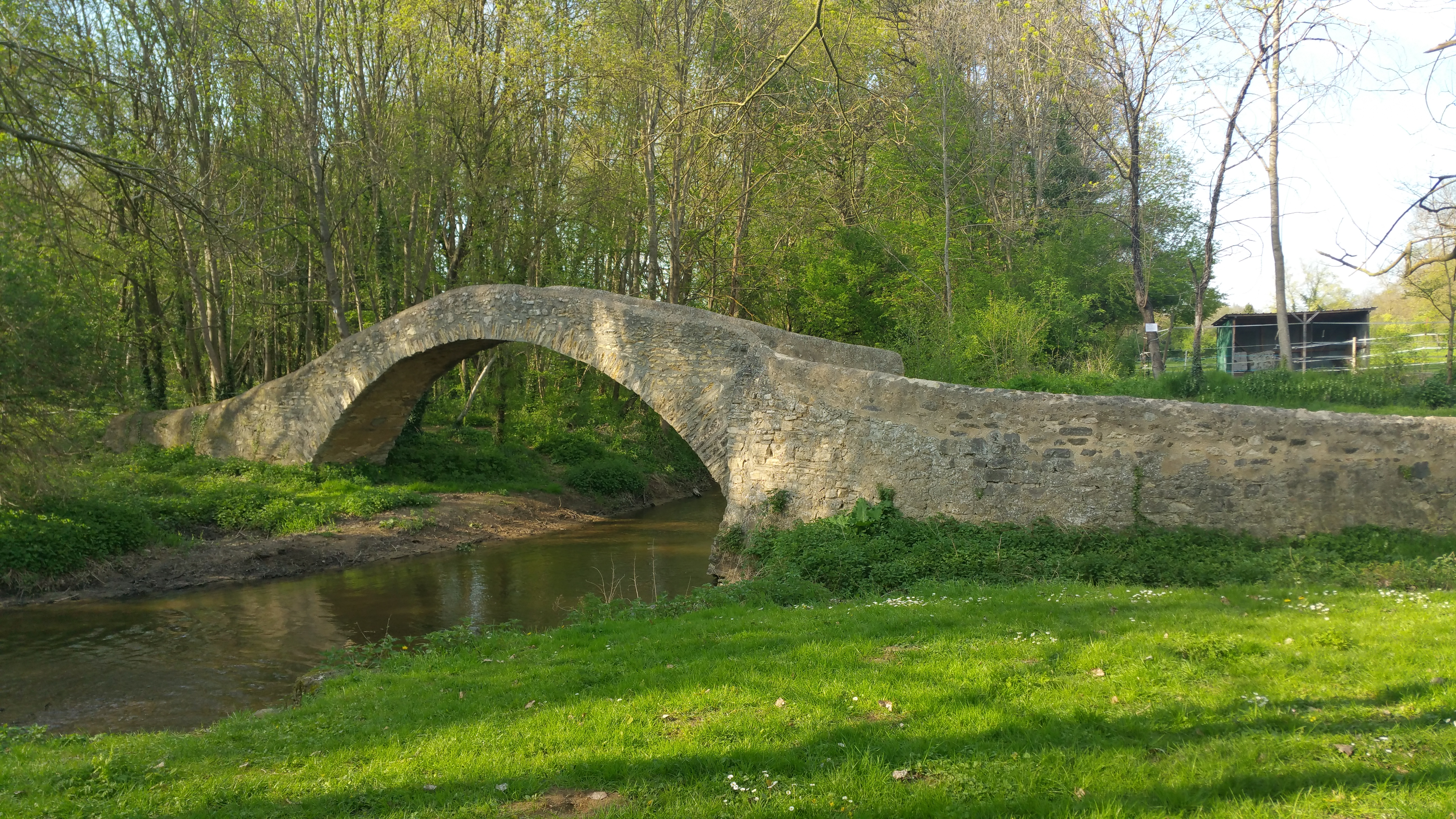 Pont romain au Cheix